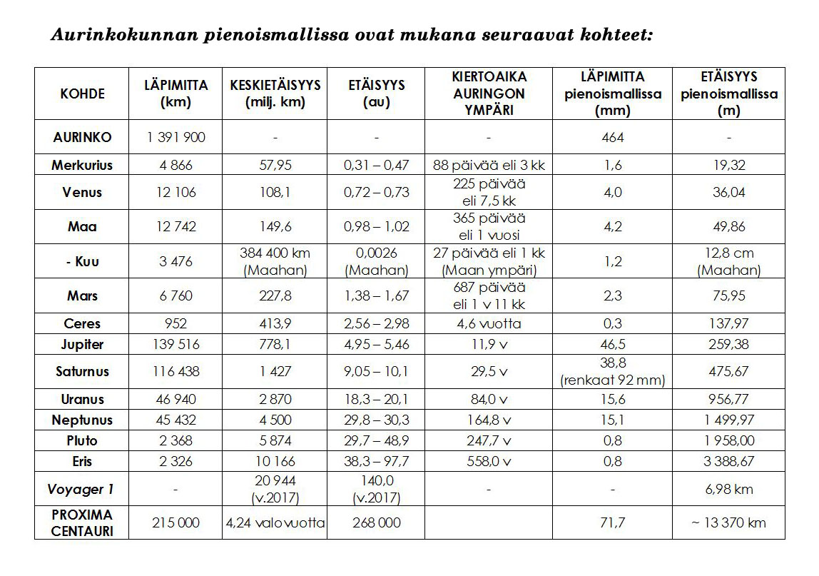 Akaan aurinkokuntamallin kohteet